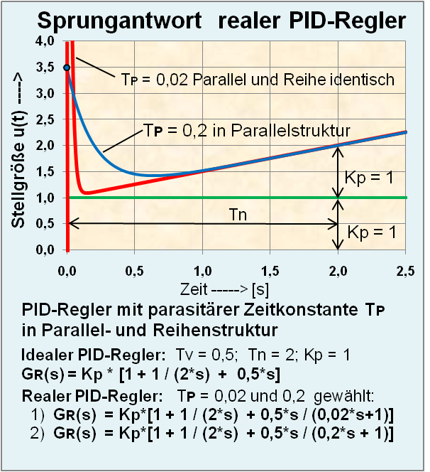 Sprungantwort eines realen PID-Reglers